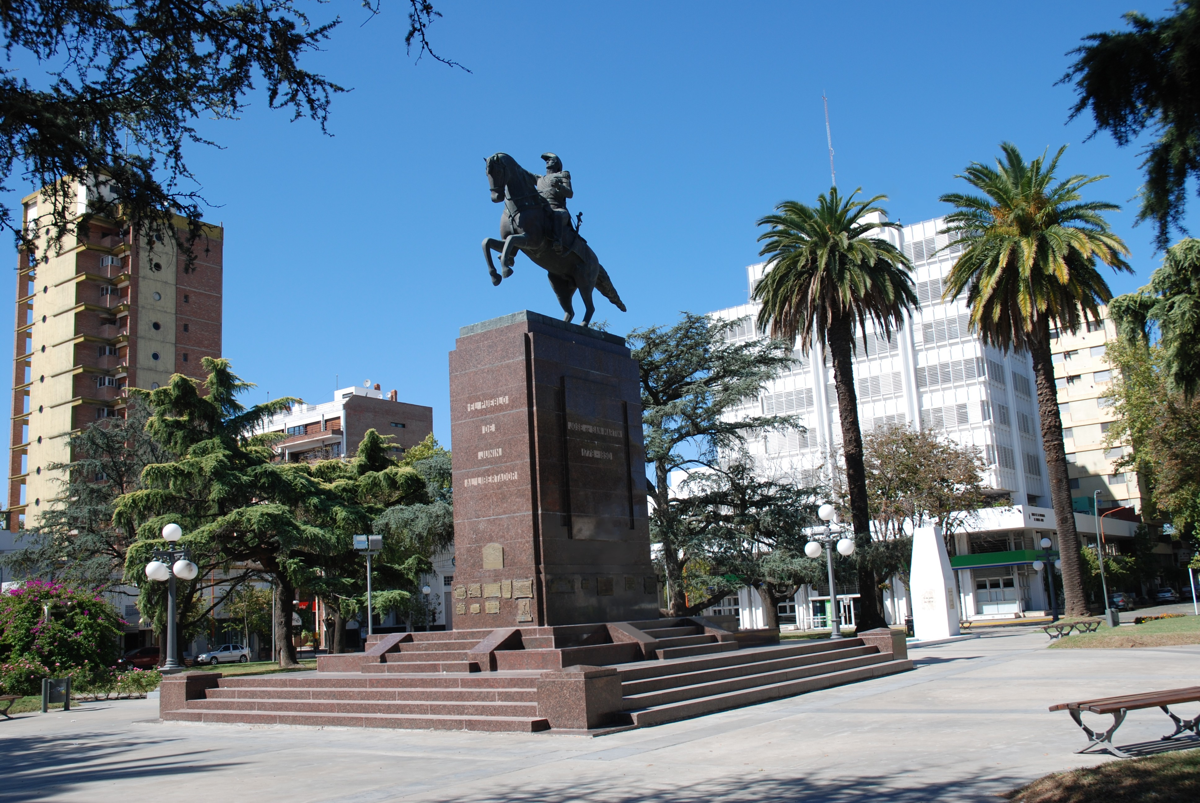 Monumento al General San Martín en la Plaza 25 de Mayo. Junín, Argentina.